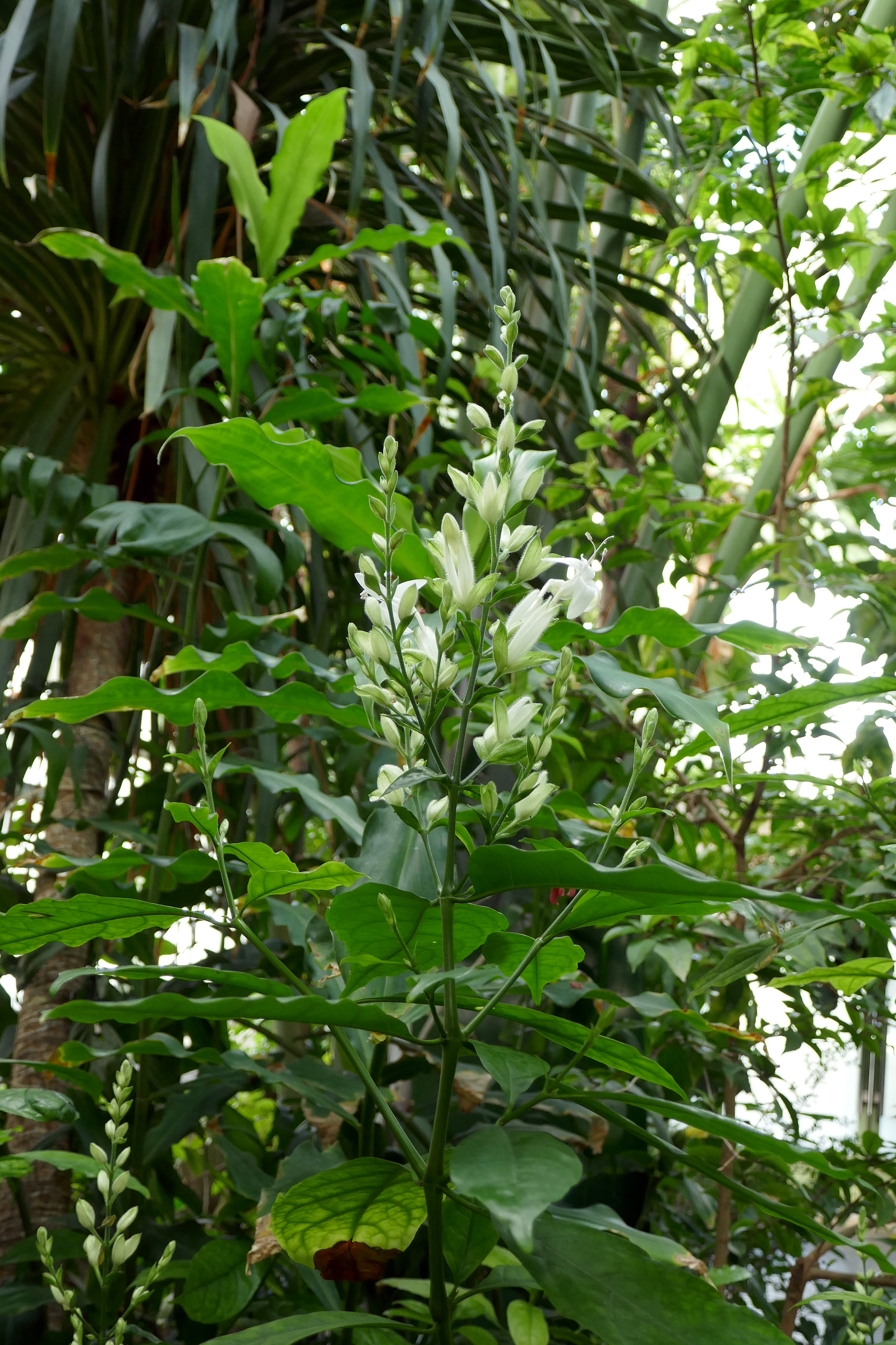 Whitfieldia elongata De Wild. & T. Durand. Afrique tropicale. Serres tropicales du Jardin des Plantes de Paris.